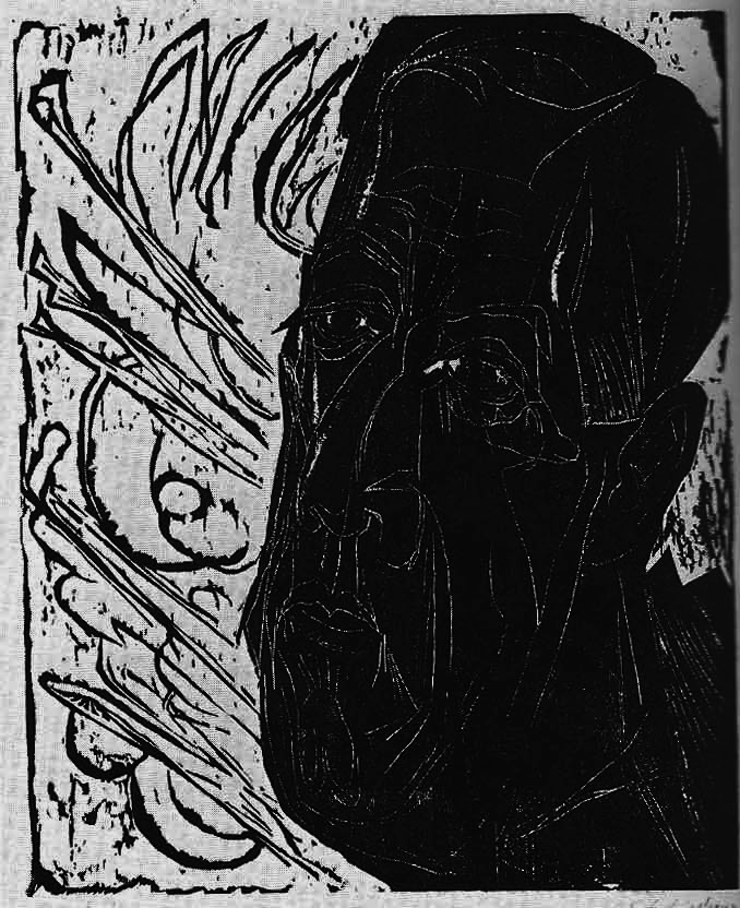 Henry van de Velde im Holzschnitt Ernst Ludwig Kirchners